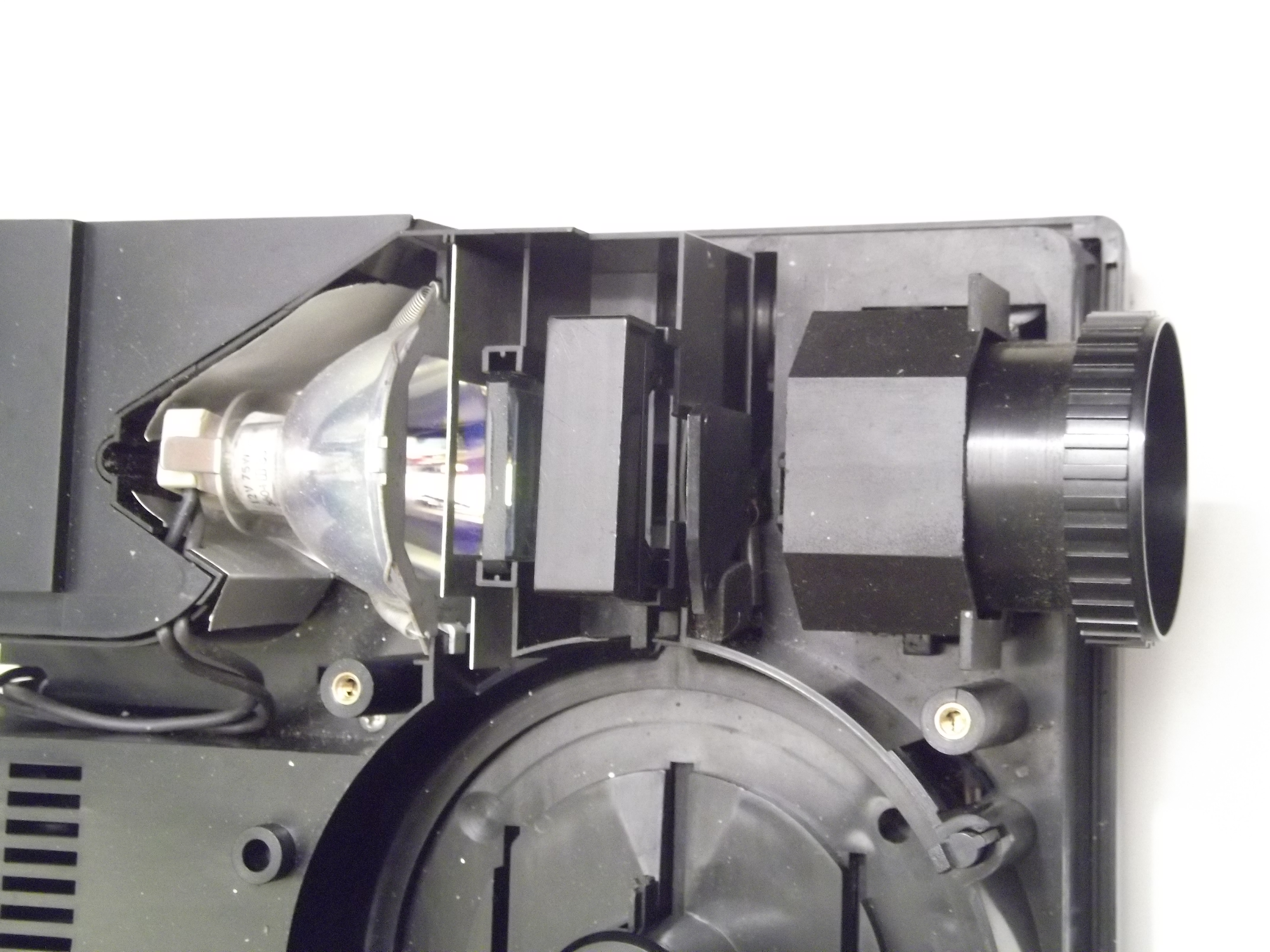 Liesegang Fantimat110, Dias 3x3cm, Rundmagazin, Beleuchtungssystem mit Elipsoid-Spiegellampe, hergestellt ab 1975, Liesegang, Düsseldorf